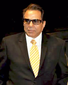 Dharmendra at Dinnanath Mageshkar Awards